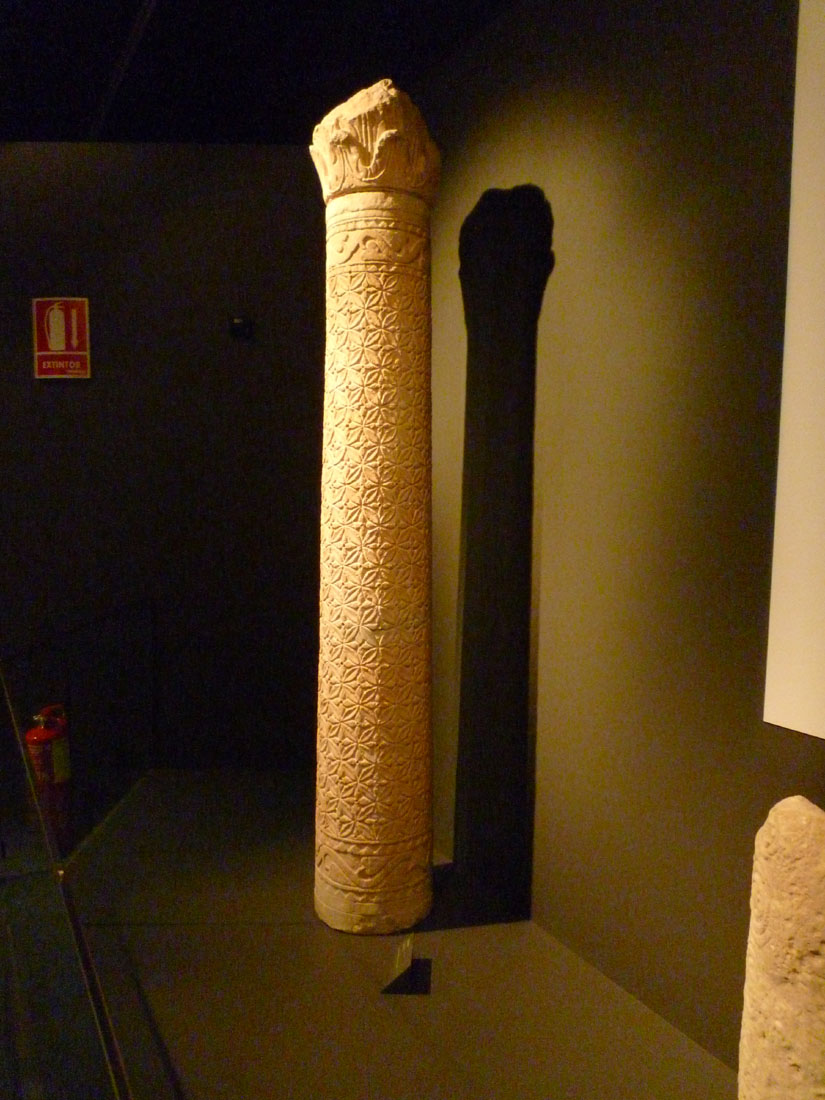 Columna de la basílica paleocristiana de Algezares en Murcia (España).